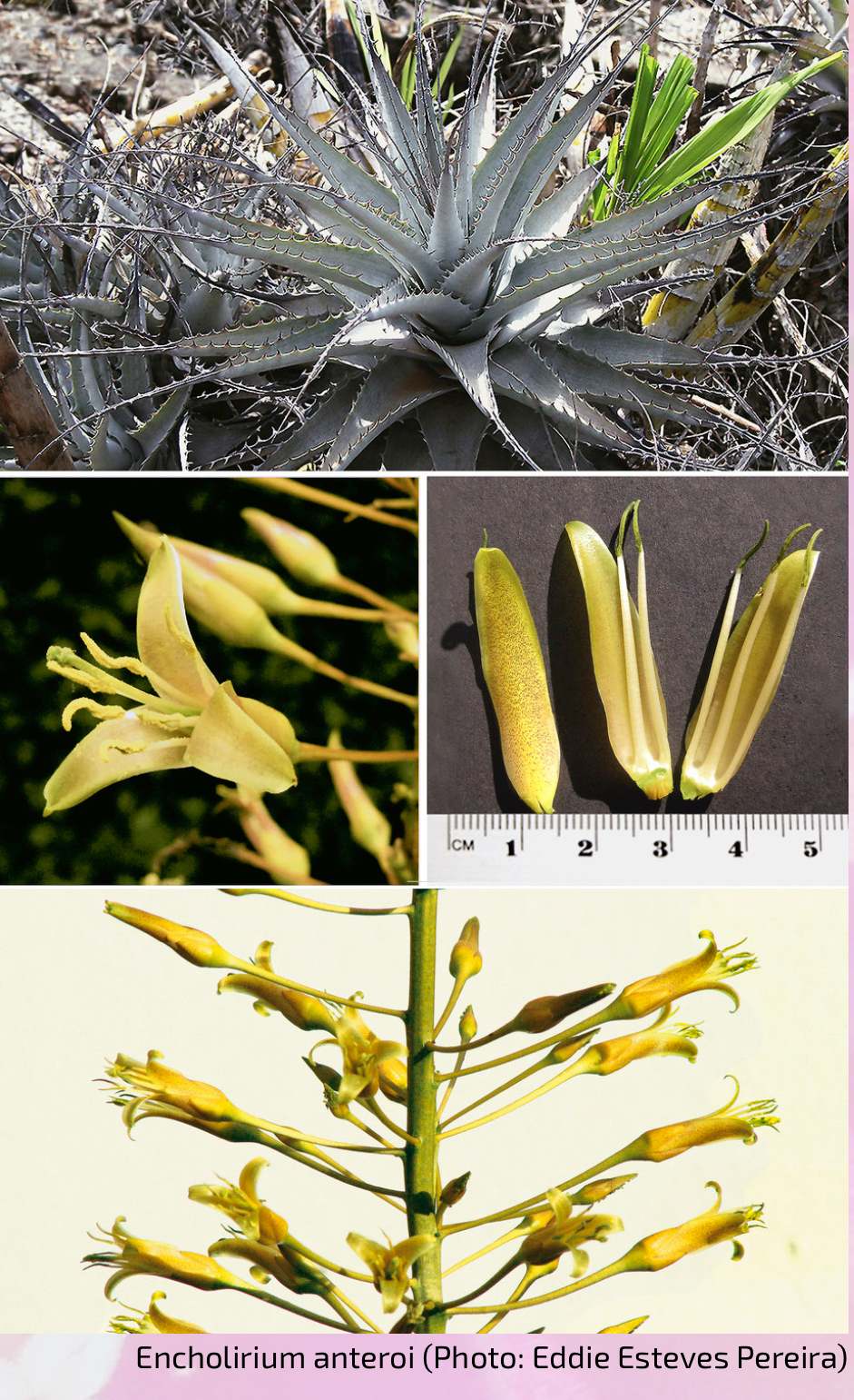 Encholirium anteroi am Typstandort, Goiás, Brasilien